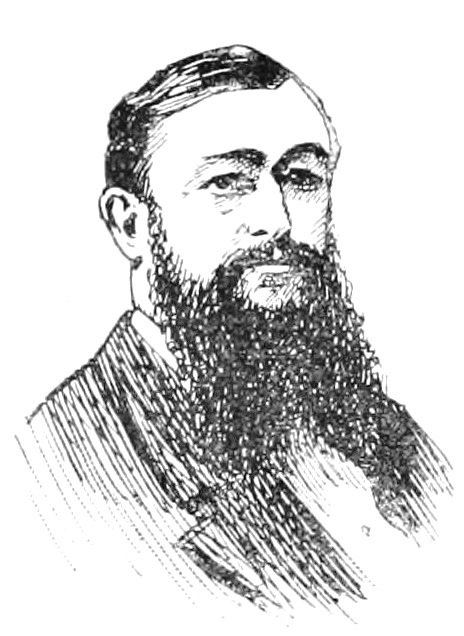 "La Nouvelle Chambre" : "Baudry d'Asson".